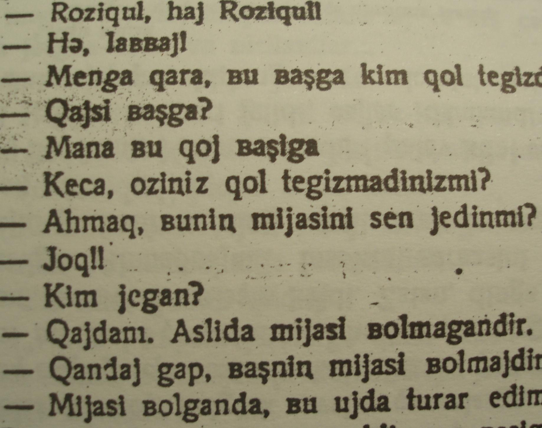 Auszug aus Abdurauf Fitrats Werk Qiyomat (usbekisches Lateinalphabet, 2. Version)